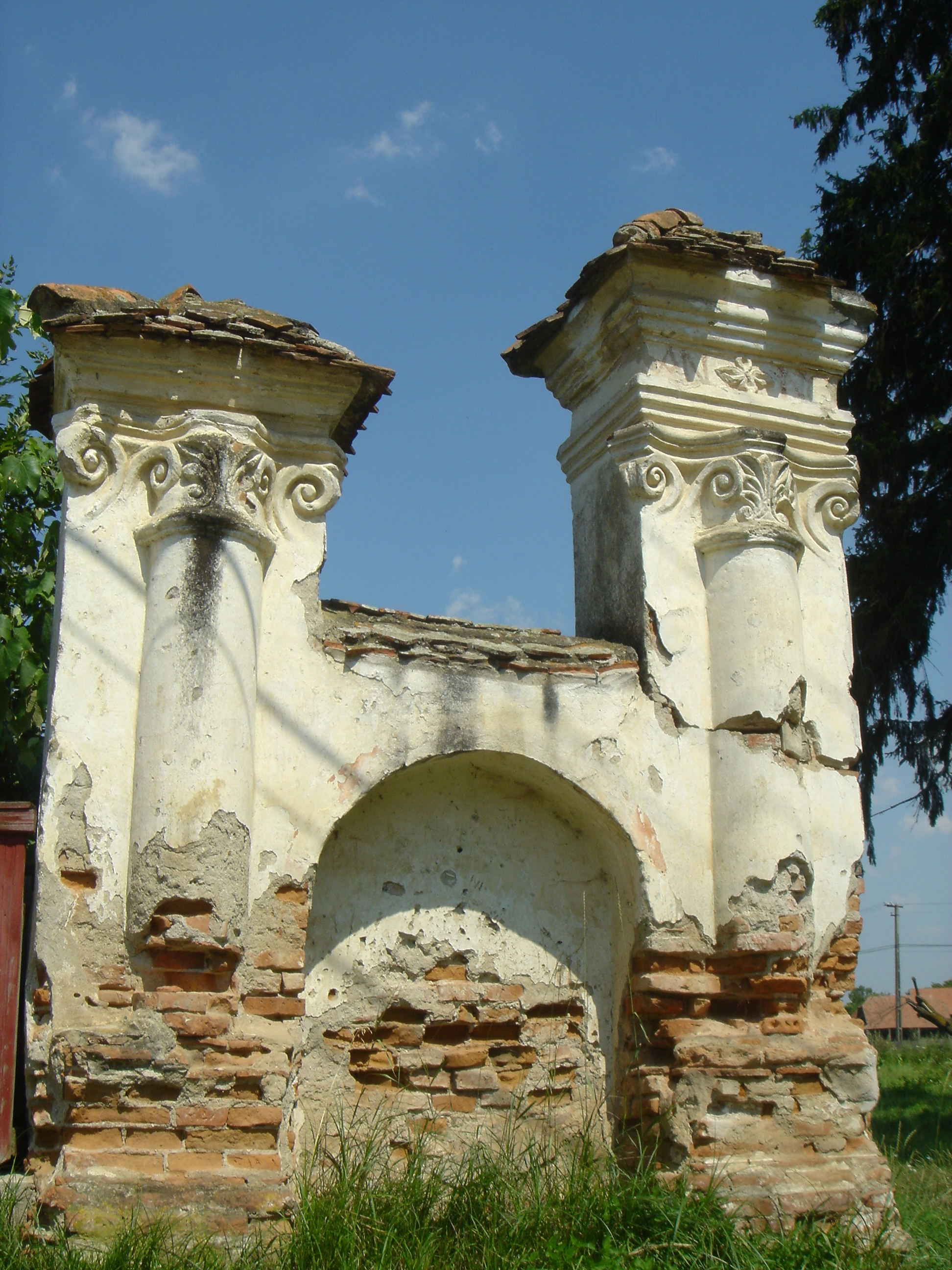 A horvath udvarhaz barokk kapuja 01